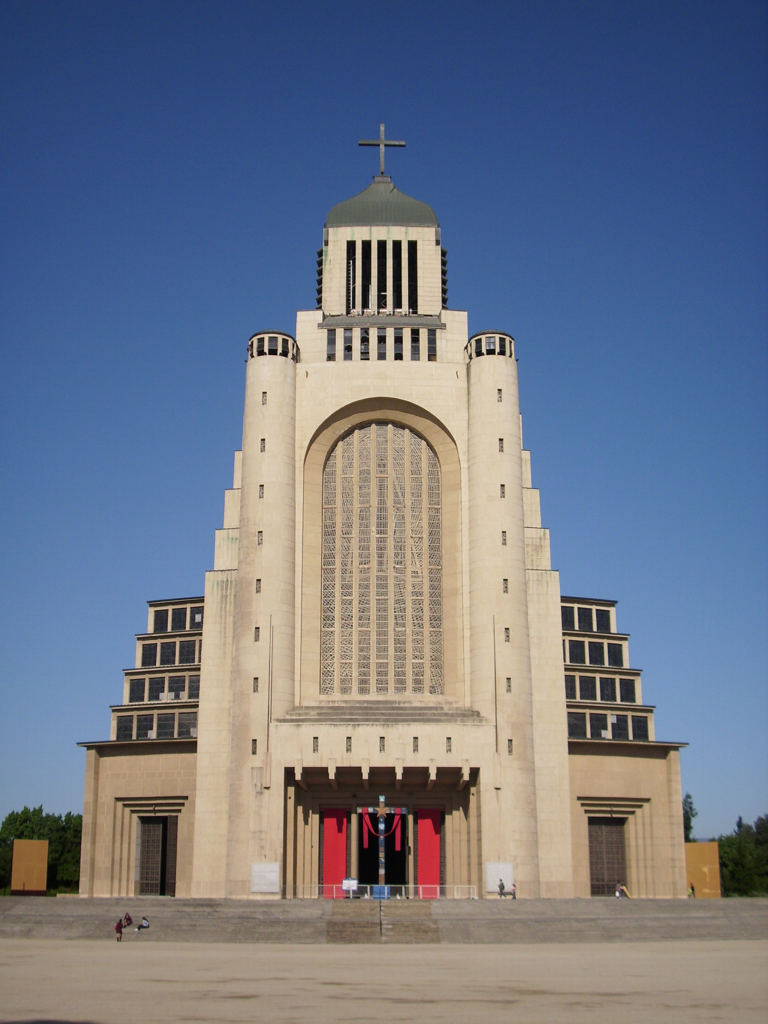 La fachada del Santuario Nacional de Maipú (Templo Votivo), en Santiago de Chile. 1 de diciembre de 2010.